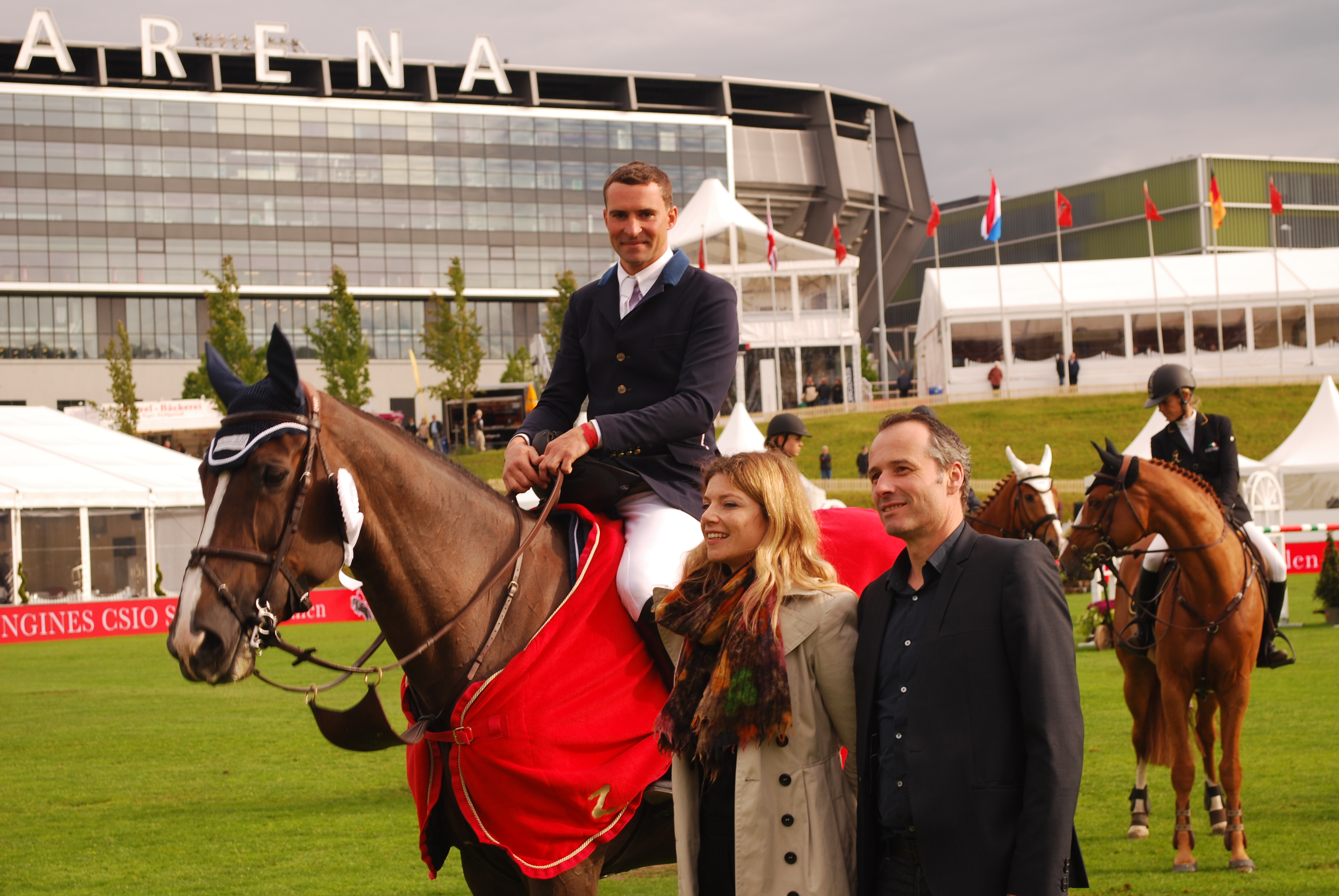 Romain Duguet hat gerade den Preis des CSIO St. Gallen gewonnen. Neben ihm: Nayla Stössel, OK-Präsidenting